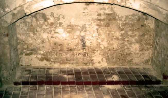 Розграбований_більшовиками_родинний_склеп_Сулим.jpg: Розграбований більшовиками родинний склеп Сулим, Свято-Покровська церква у селі Сулимівці (Бориспільський район, Київська область), березень 2007 року